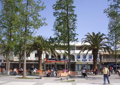 Plaza de Puente Alto. Ciudad que forma parte del Sector Sur Oriente del Gran Santiago de Chile.